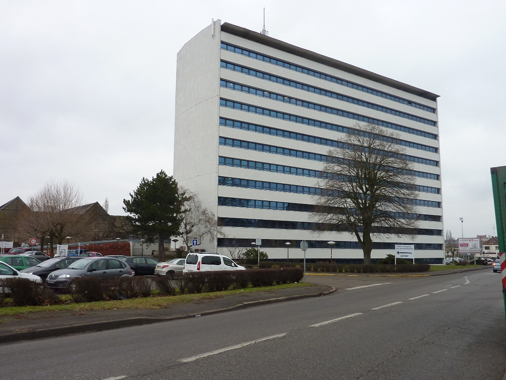 ancienne direction des Houillères du Bassin de Lorraine ( H.B.L )